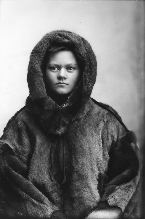 Berg & Høeg Marie Høeg i selskinnspels. ca. 1895-1903. Sølvgelatin på barytt. NMFF.000418-13